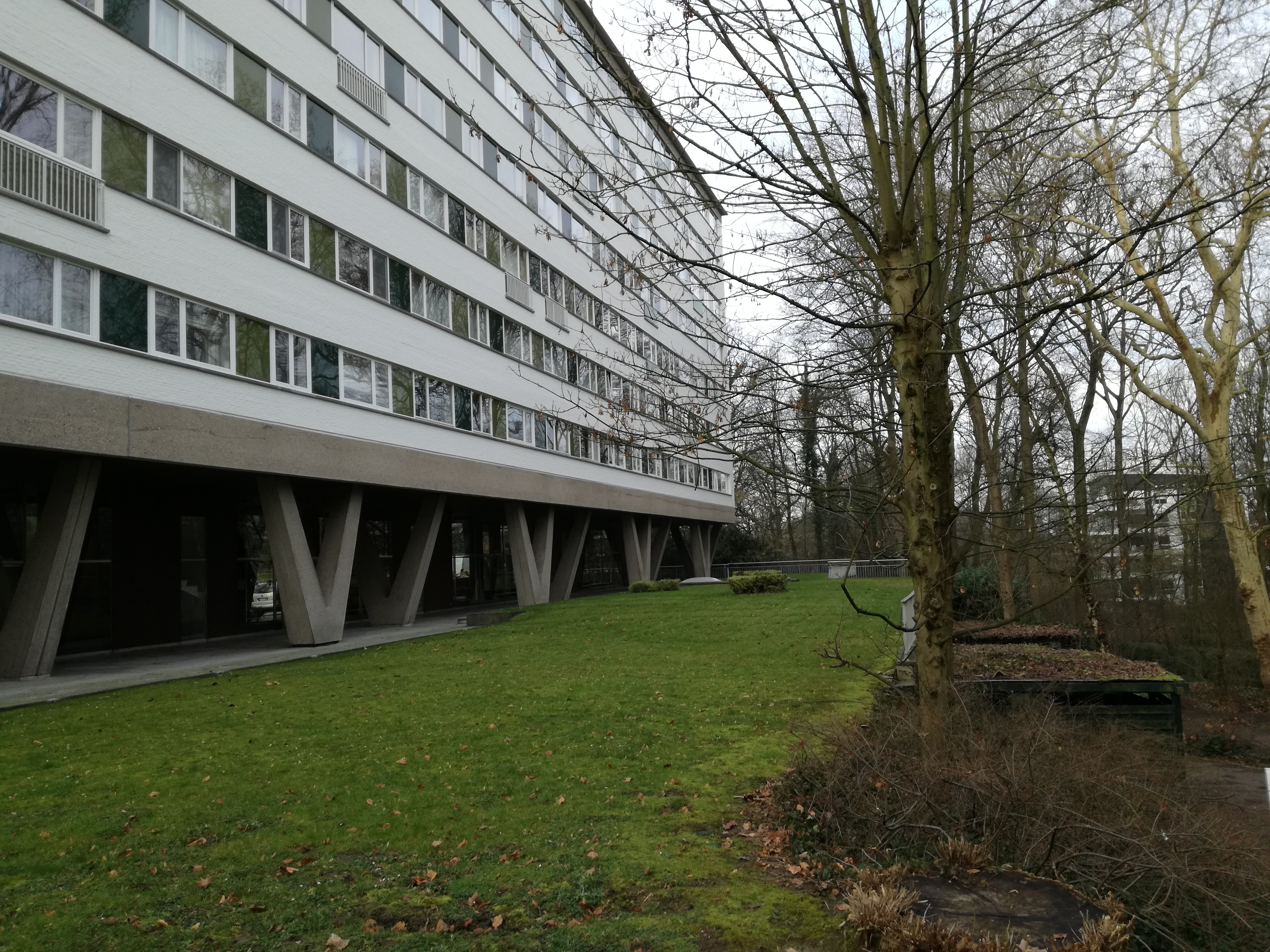 Façade nord de la résidence Eden Green